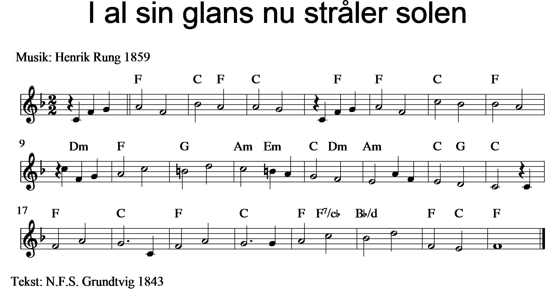 I al sin glans nu stråler solen.